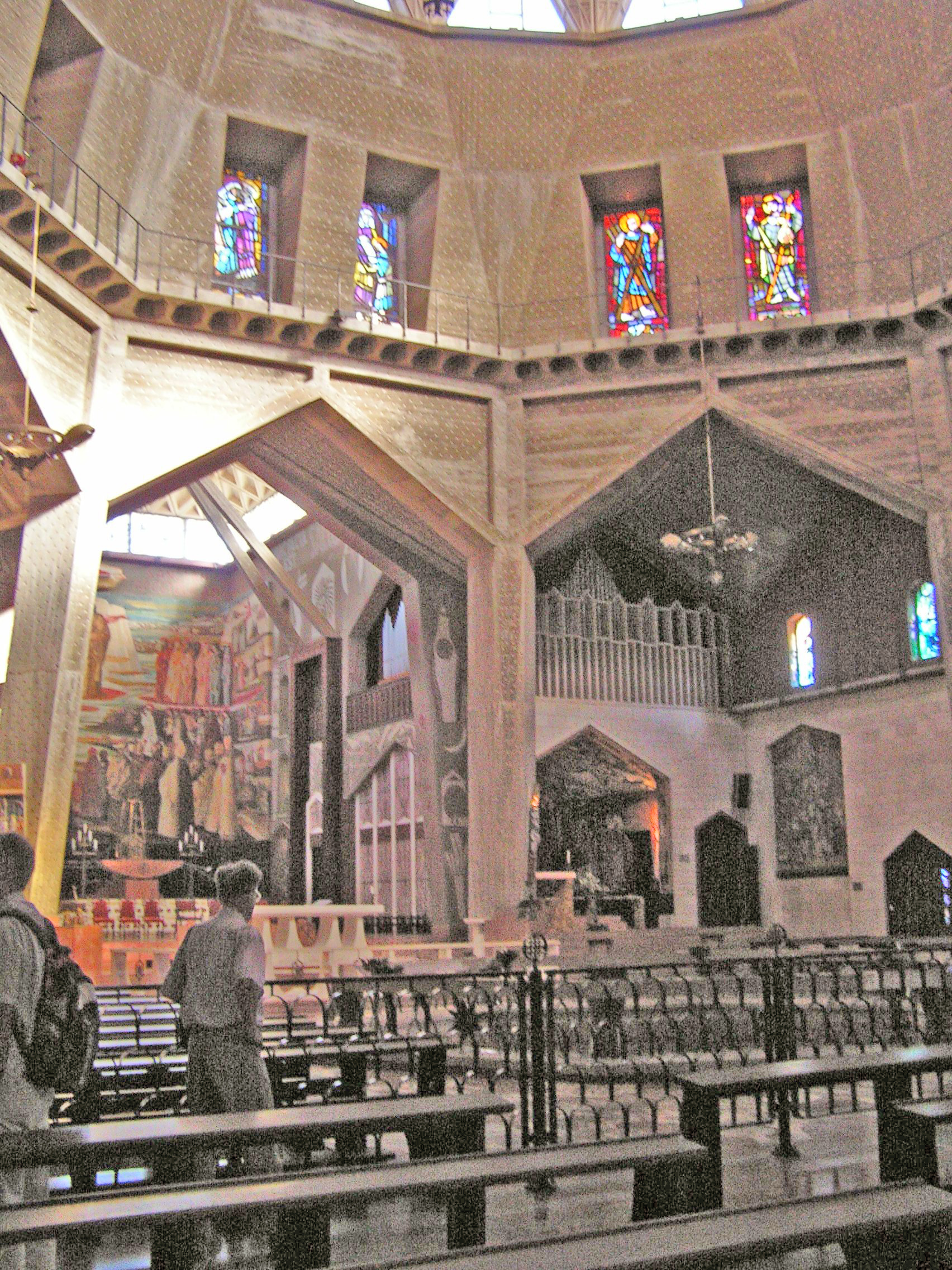 Nazareth Verkënnegungsbasilika Source:ex-Commons; Foto vum Commons User:Athenchen; opgehellt vum Cornischong